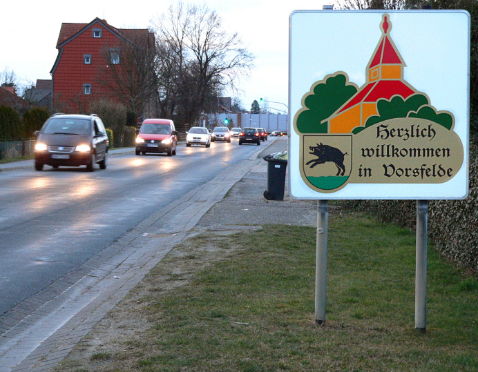 Schild Ortseingang Vorsfelde